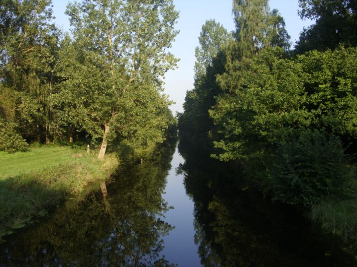 Barnbruch / Allerkanal (bey Weyhausen)